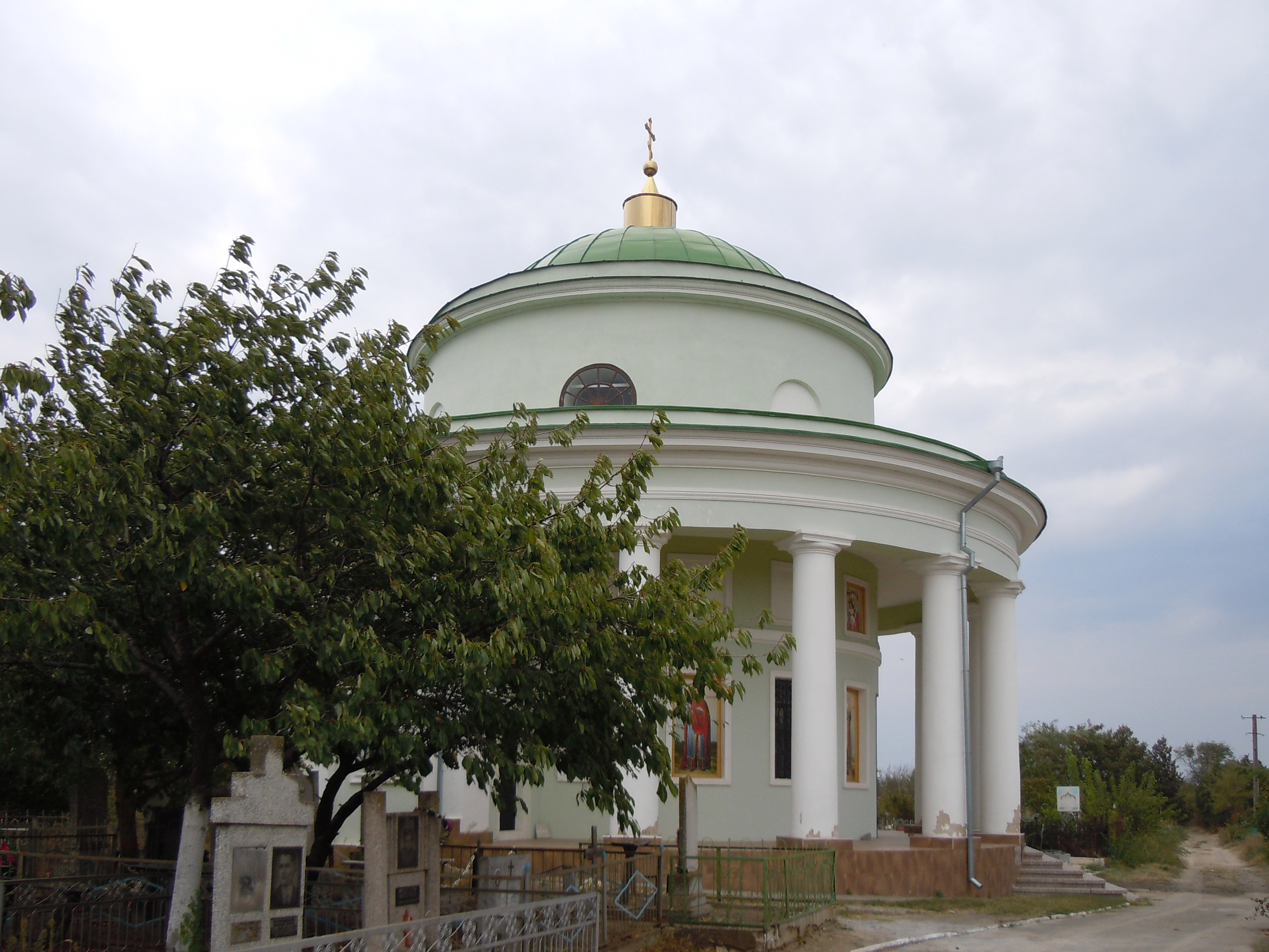 Мавзолей Інзова (Митрофанівська церква), Болград, Міське православне кладовище